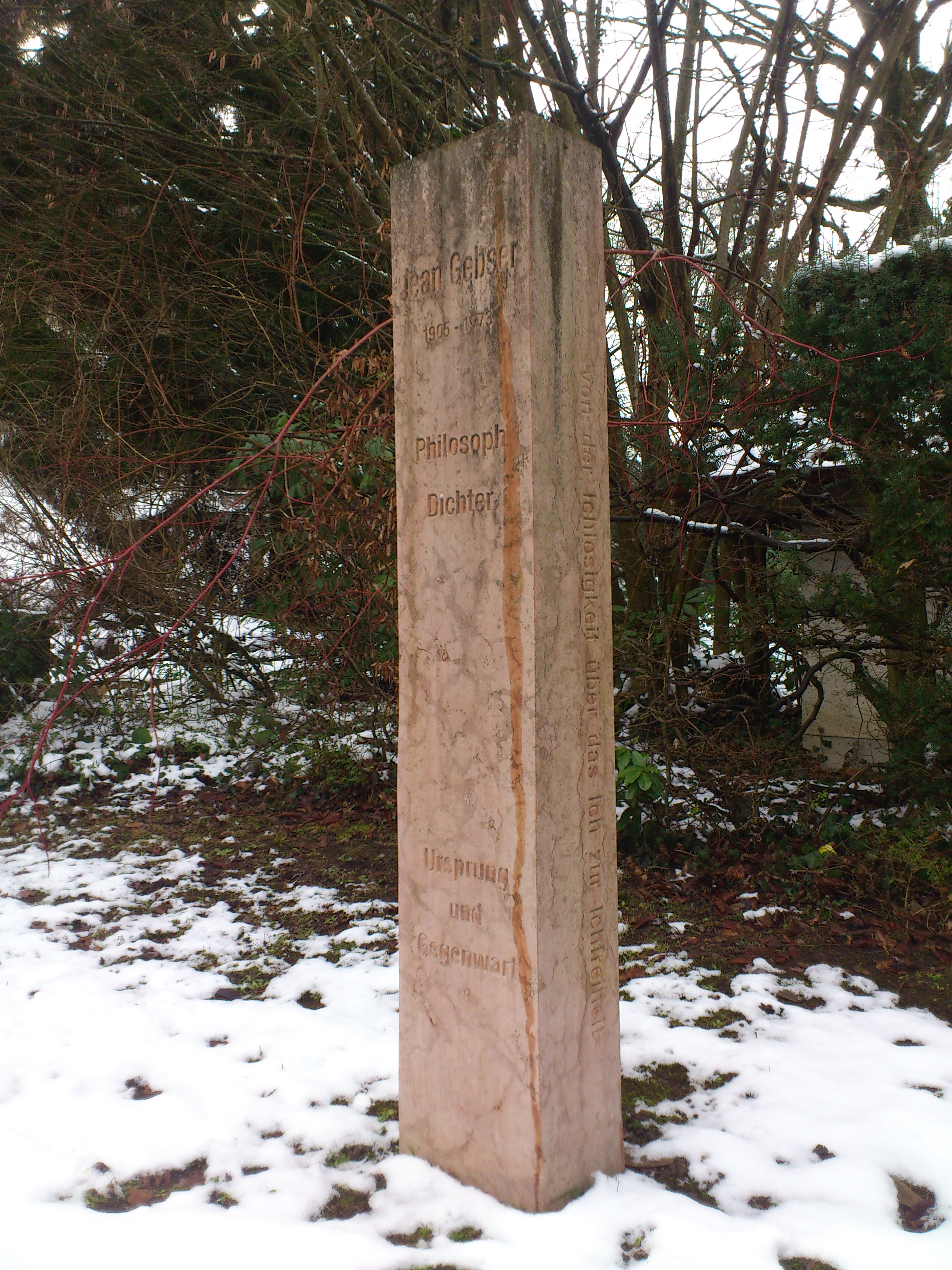 Jean Gebser: Gedenk-Stele neben der reformierten Kirche von Wabern bei Bern (Schweiz). Vorne steht: Jean Gebser, 1905-1973, Ursprung und Gegenwart, auf der rechten Seite: «von der Ichlosigkeit über das Ich zur Ichfreiheit», auf der Rückseite: «Lieben ist gesteigertes Leben.» Stele von Wolfgang Zät. Errichtet von der Jean Gebser-Gesellschaft am 14. September 2007